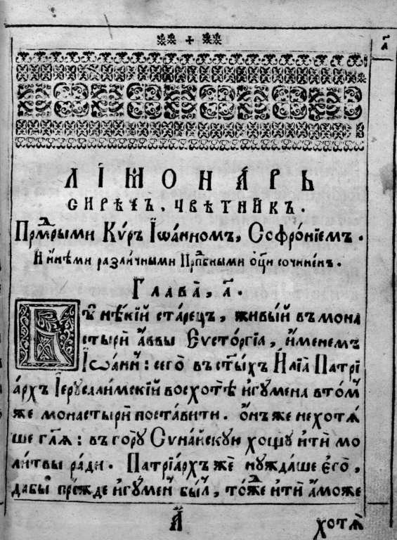 Иоанн Мосх. "Лимонарь". Киев. 1628 год. тип. Спиридон Соболь.